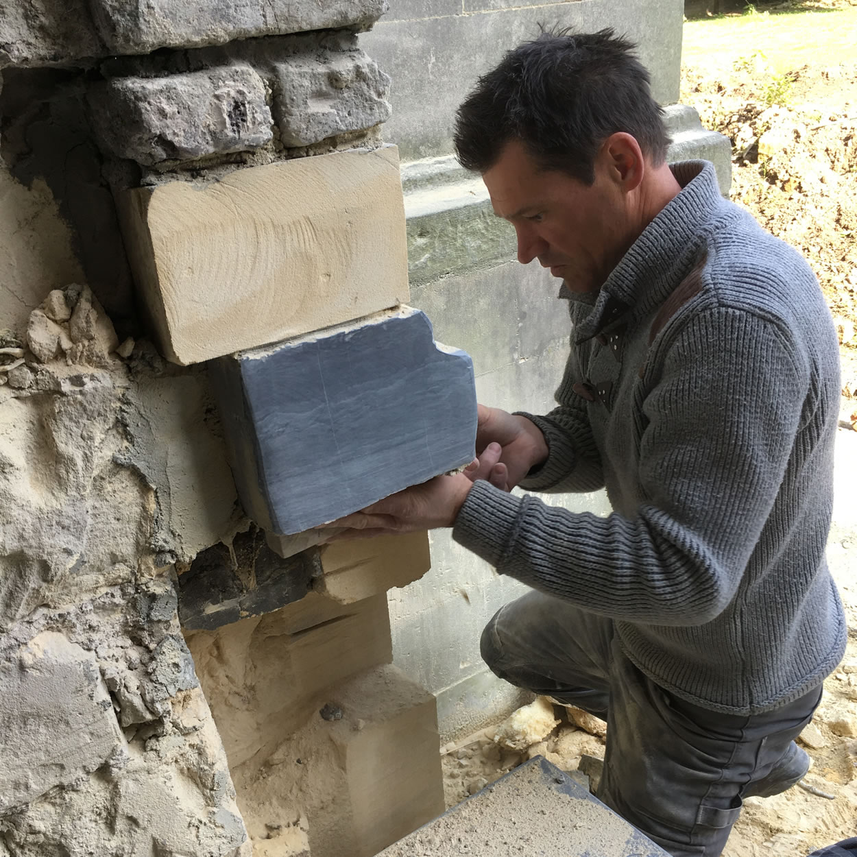 Herstel van mergelblokken aan de entree van de Andrieskapel te Maastricht